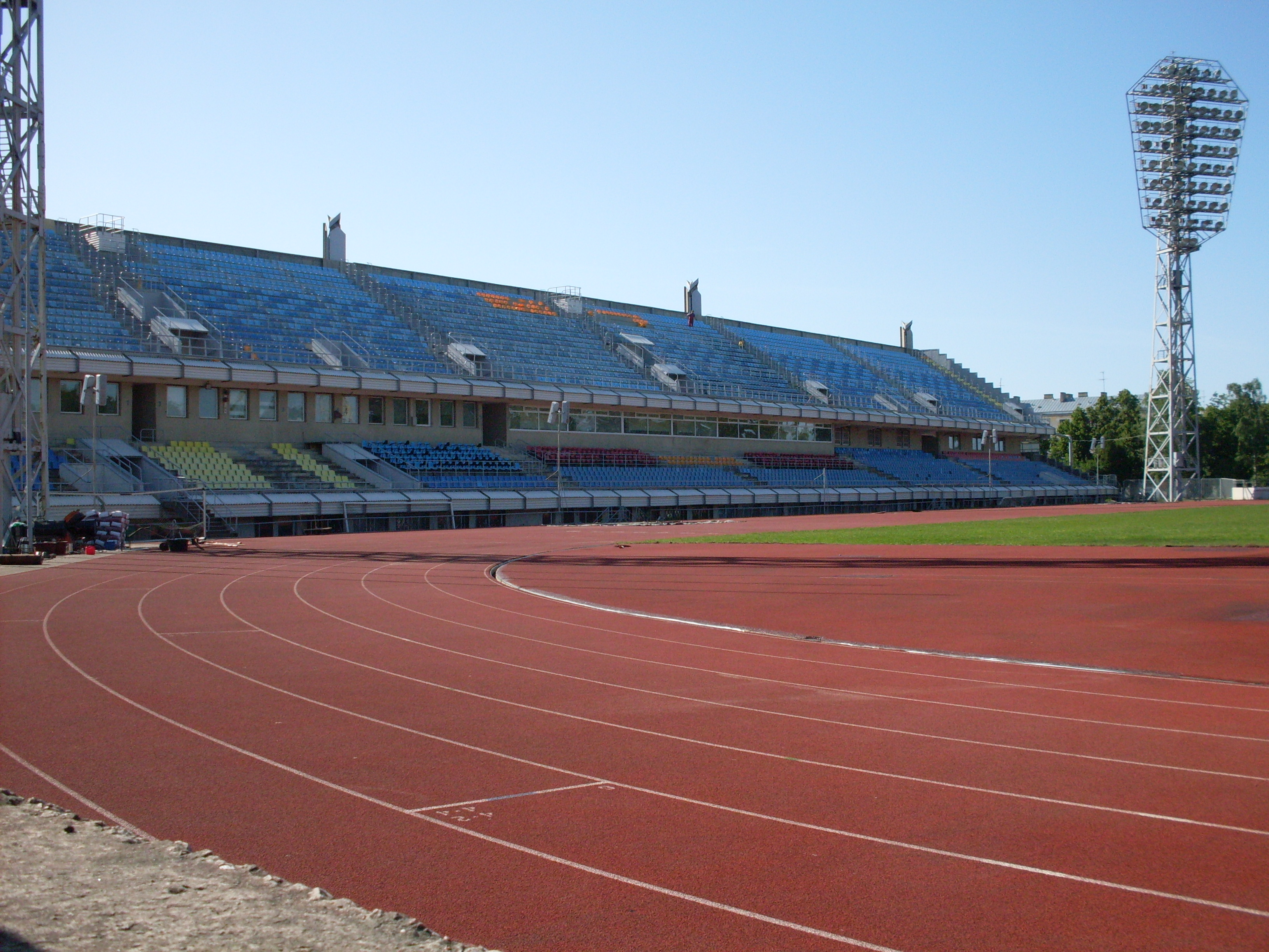 Grīziņkalns, Latgale Suburb, Riga, Latvia